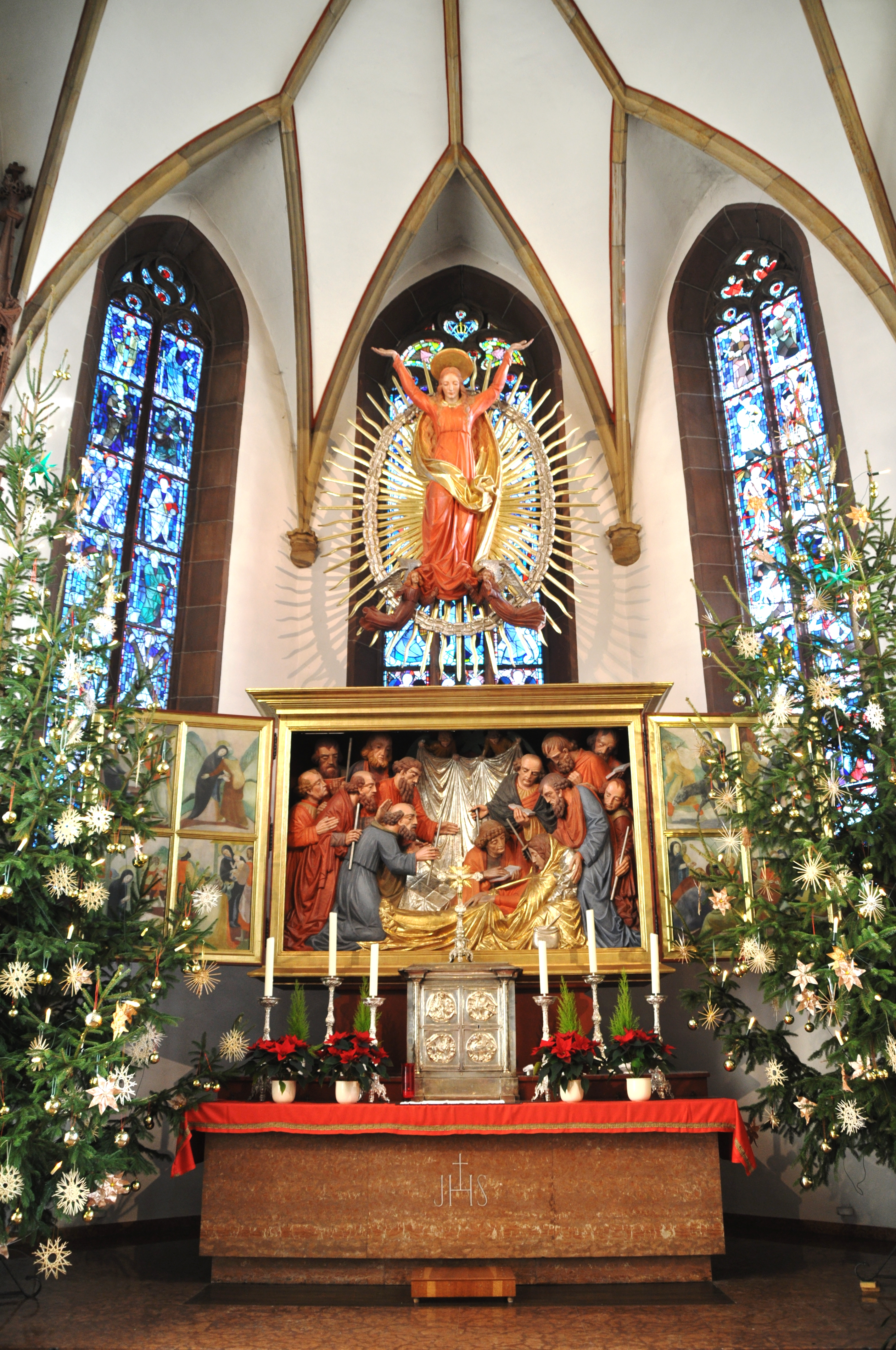 Flügelaltar (Marienaltar)von 1950, Kath. Pfarrkirche St. Maria Himmelfahrt Herxheim